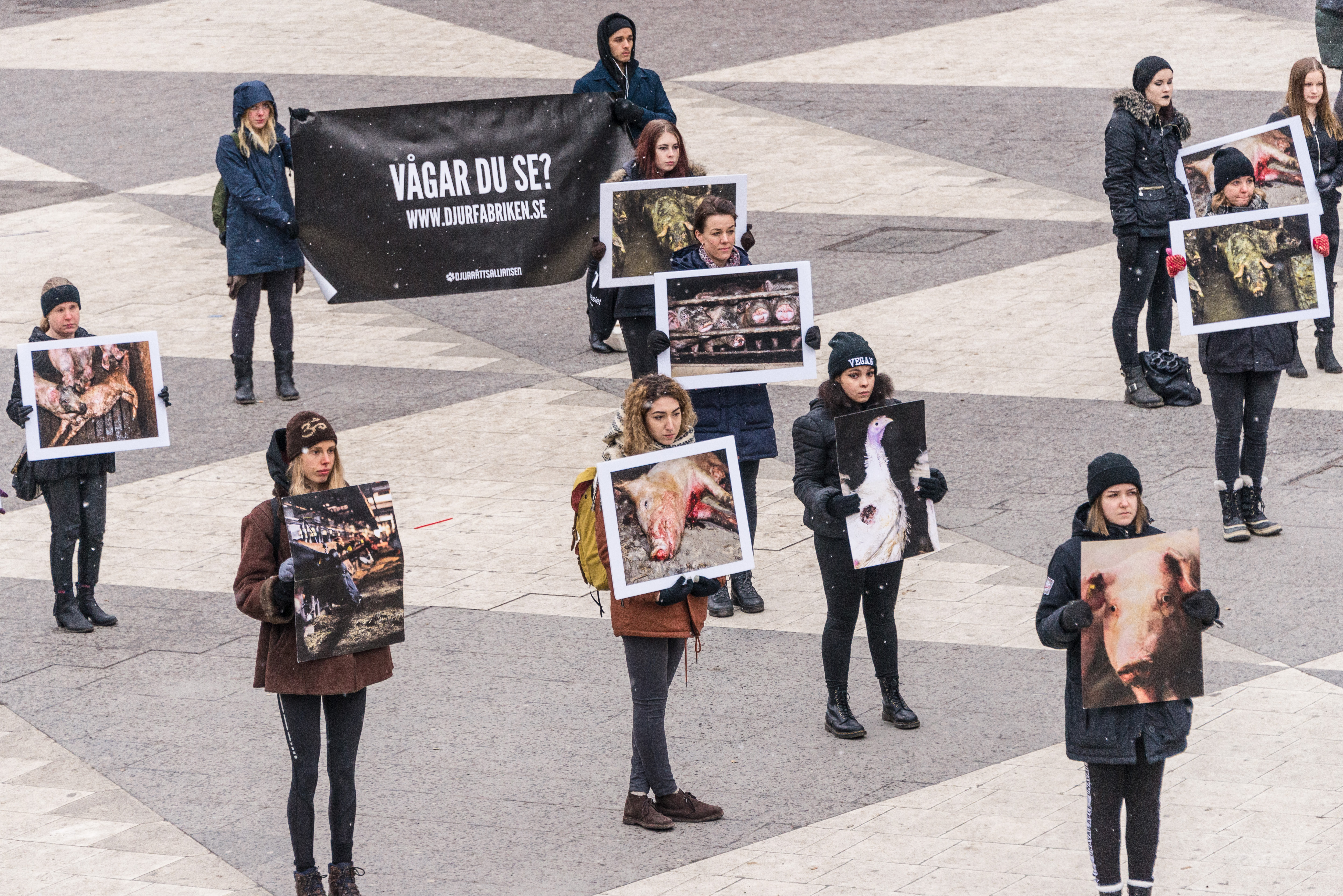 Djurrättsalliansen genomför en manifestation på Sergels torg i Stockholm den 5 februari 2017.